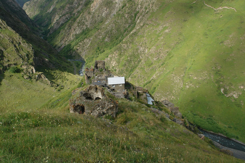 Ardoti in Khevsureti Georgia